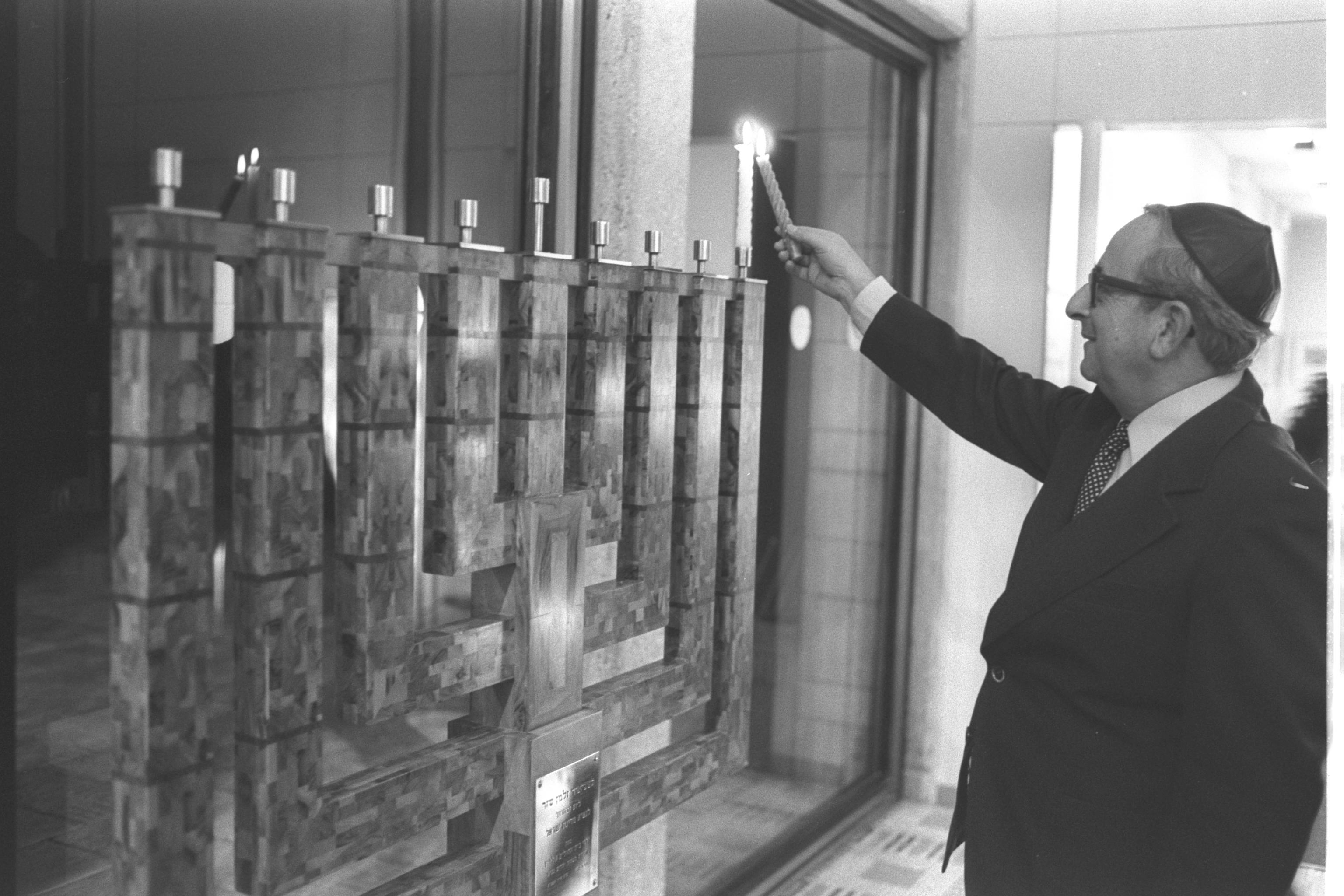 President Yitzhak Navon lighting the first Hanuka candle at Beit Hanassi in Jerusalem (24/12/1978). . נשיא המדינה יצחק נבון מדליק נר ראשון של חנוכה, בבית הנשיא בירושלים. Photo: SAAR YAACOV.